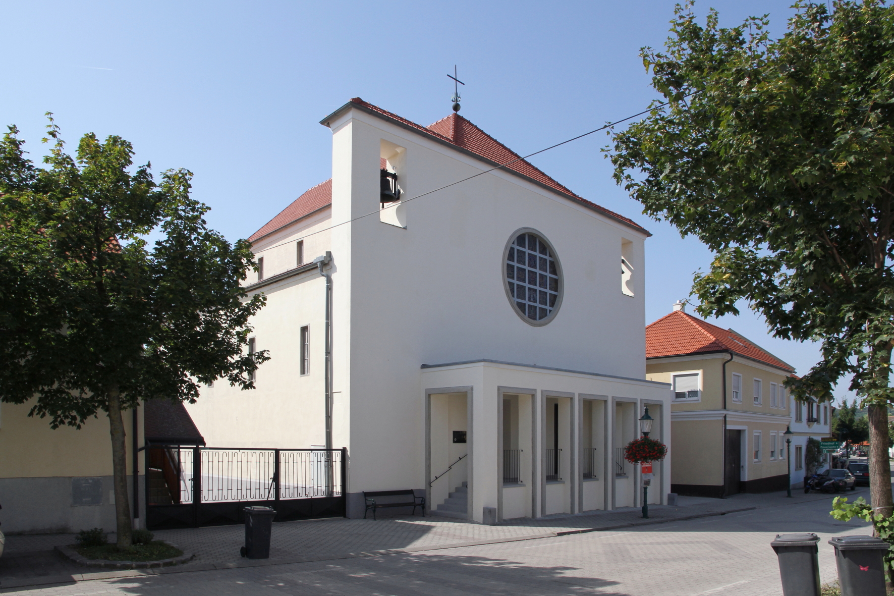 Die neue röm.-kath. Pfarrkirche Herz Jesu in der burgenländischen Marktgemeinde Jois.